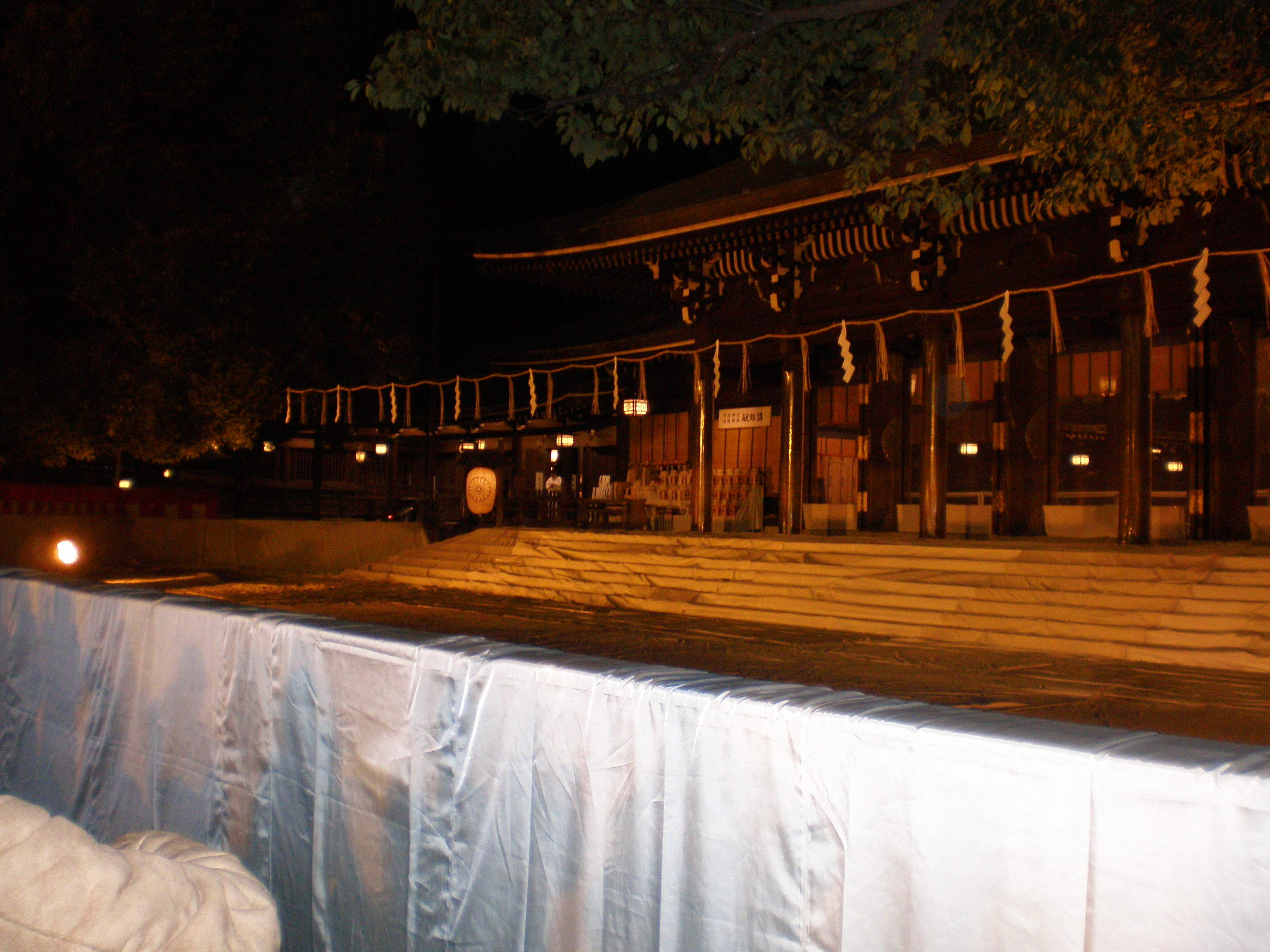 Meiji Shrine Saisenbako on January 1.